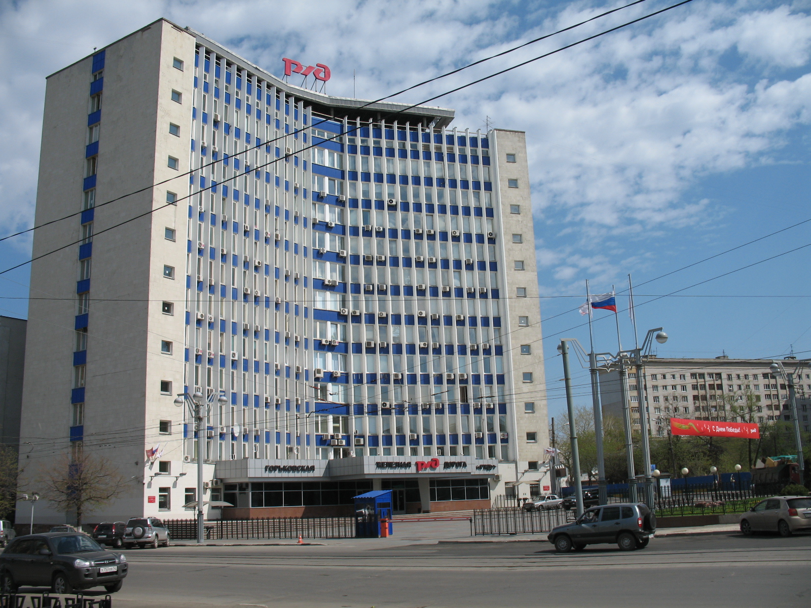 Главное здание Горьковской ЖД ОАО "РЖД"